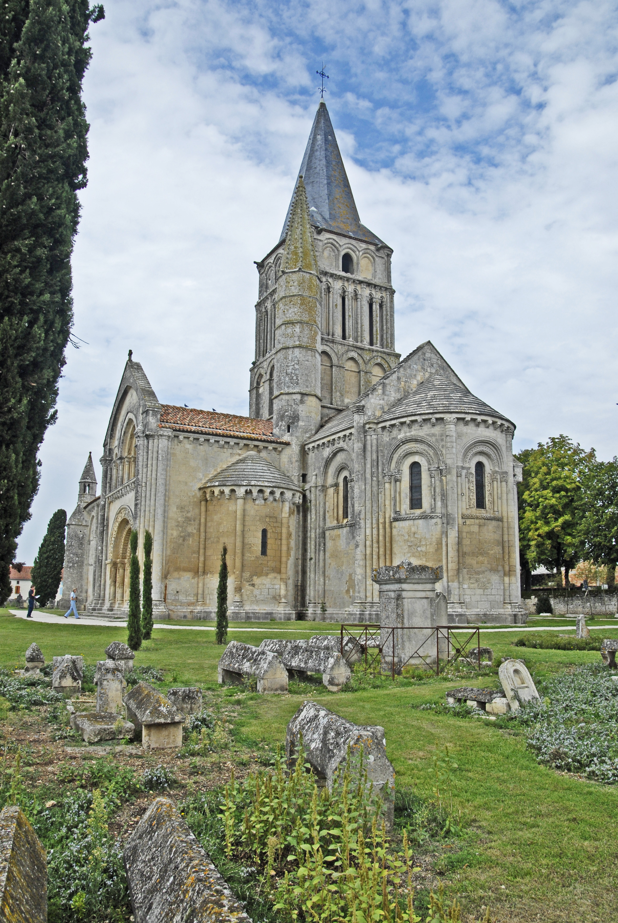 St-PIerre d'Aulnay, Chorhaupt, Querhaus und Vierungsturm von Nordost